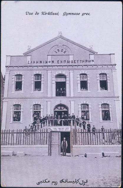 Гръцката гимназия в Лозенград